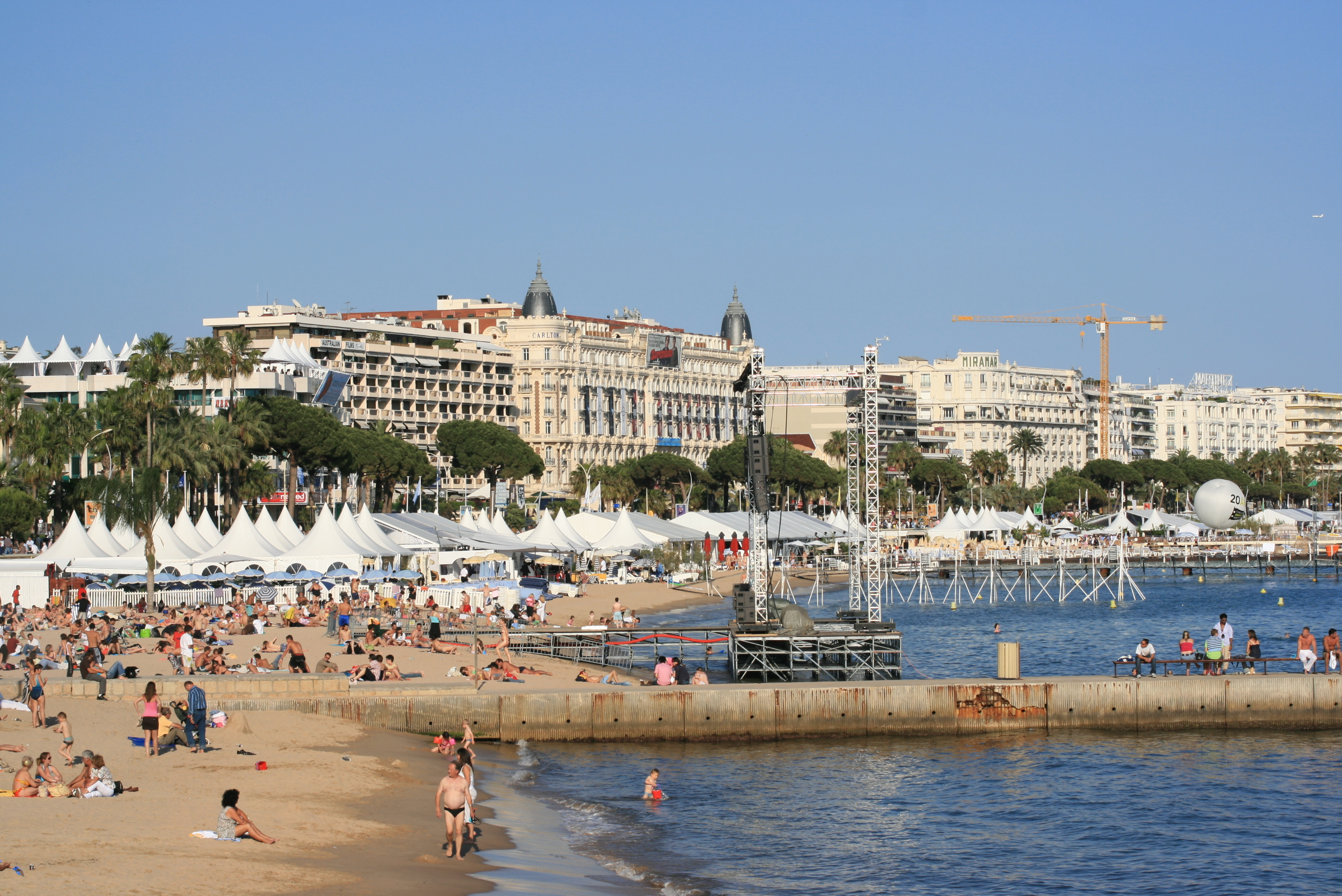 Vue sur la Croisette lors du 60e Festival de Cannes